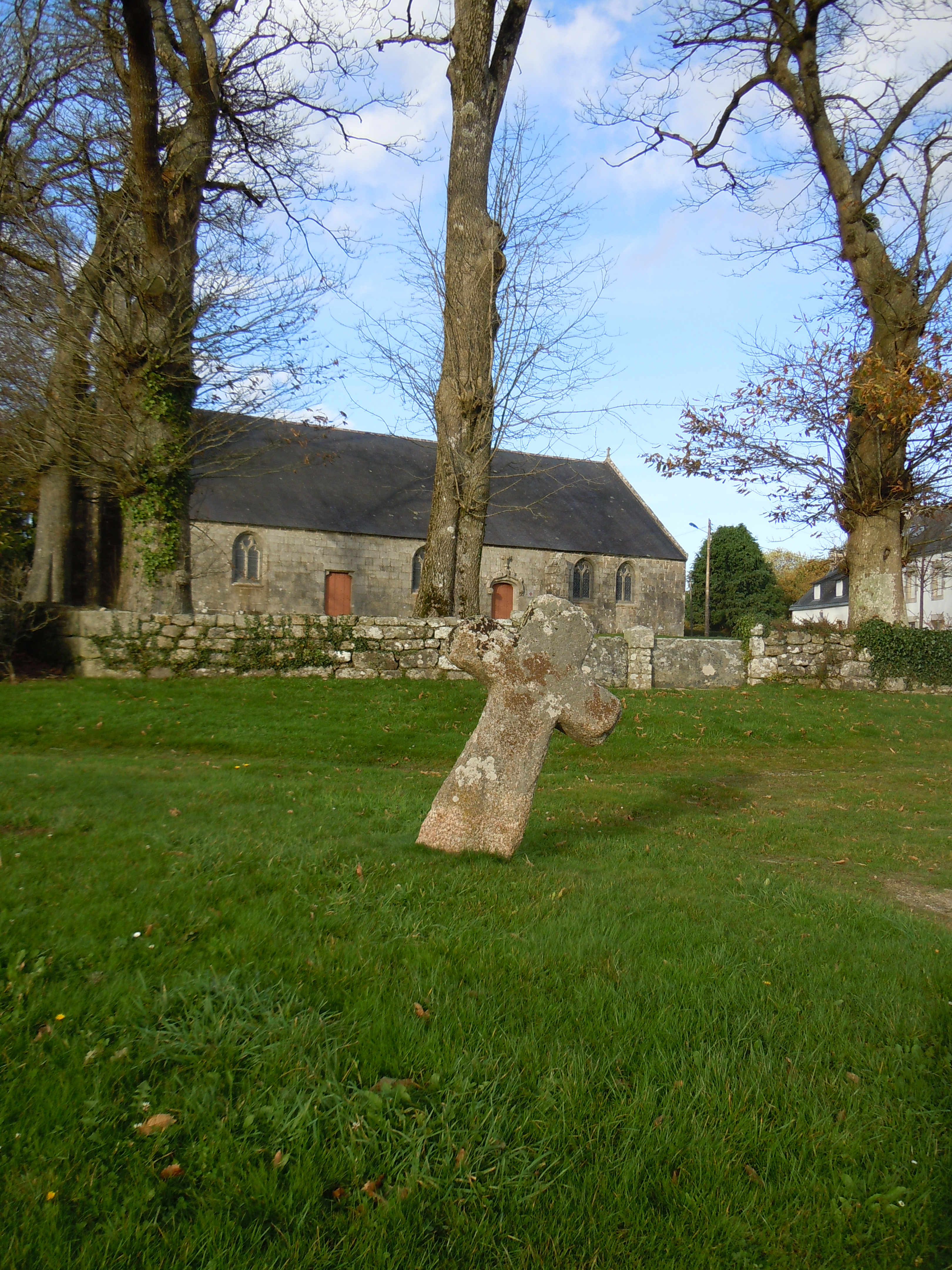 vue d'ensemble de la chapelle de Coadry de Scaër et d'une des deux croix situées à proximité. (Finistère)